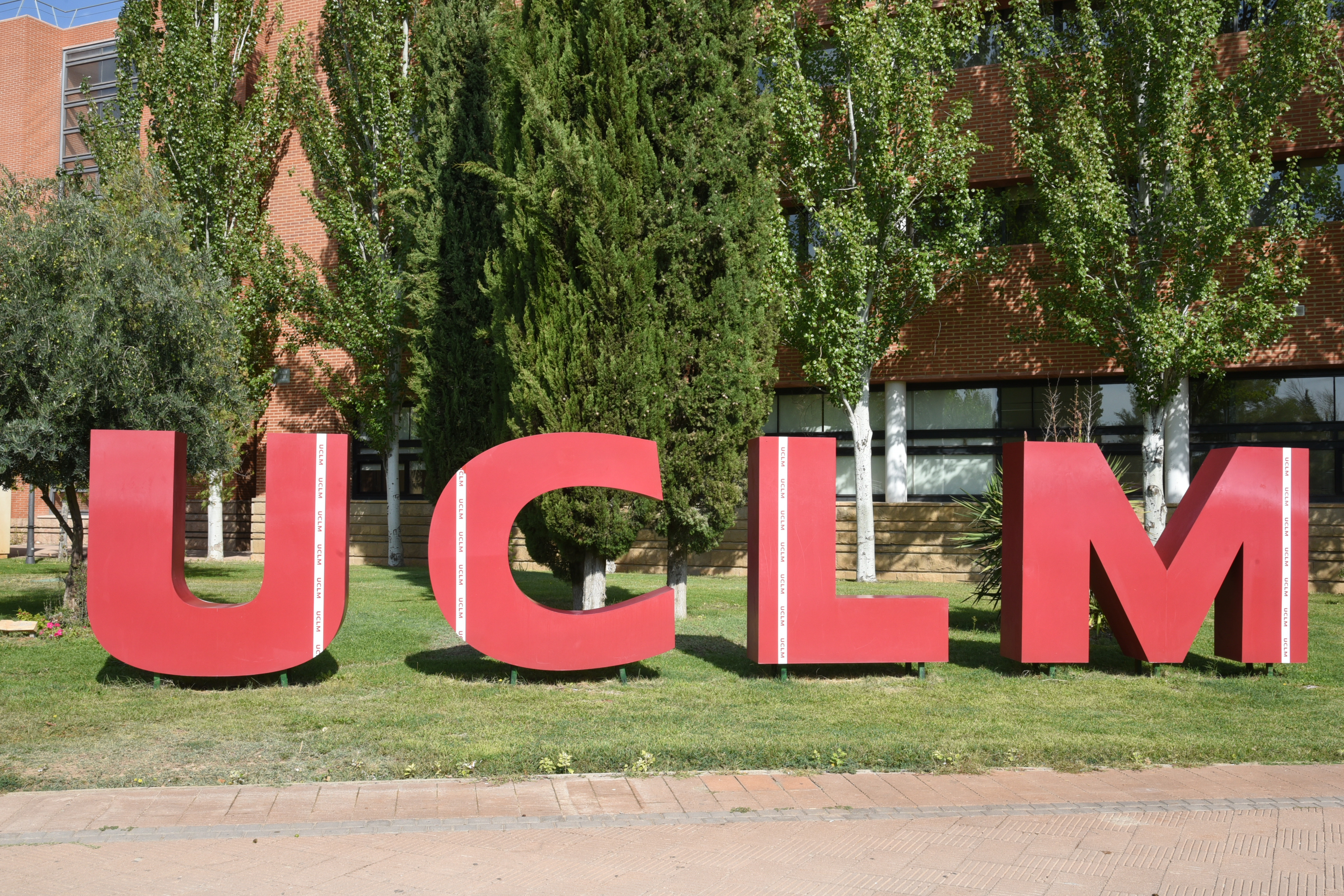 Escultura logo UCLM. Plaza de la Universidad. Ciudad Universitaria de Albacete